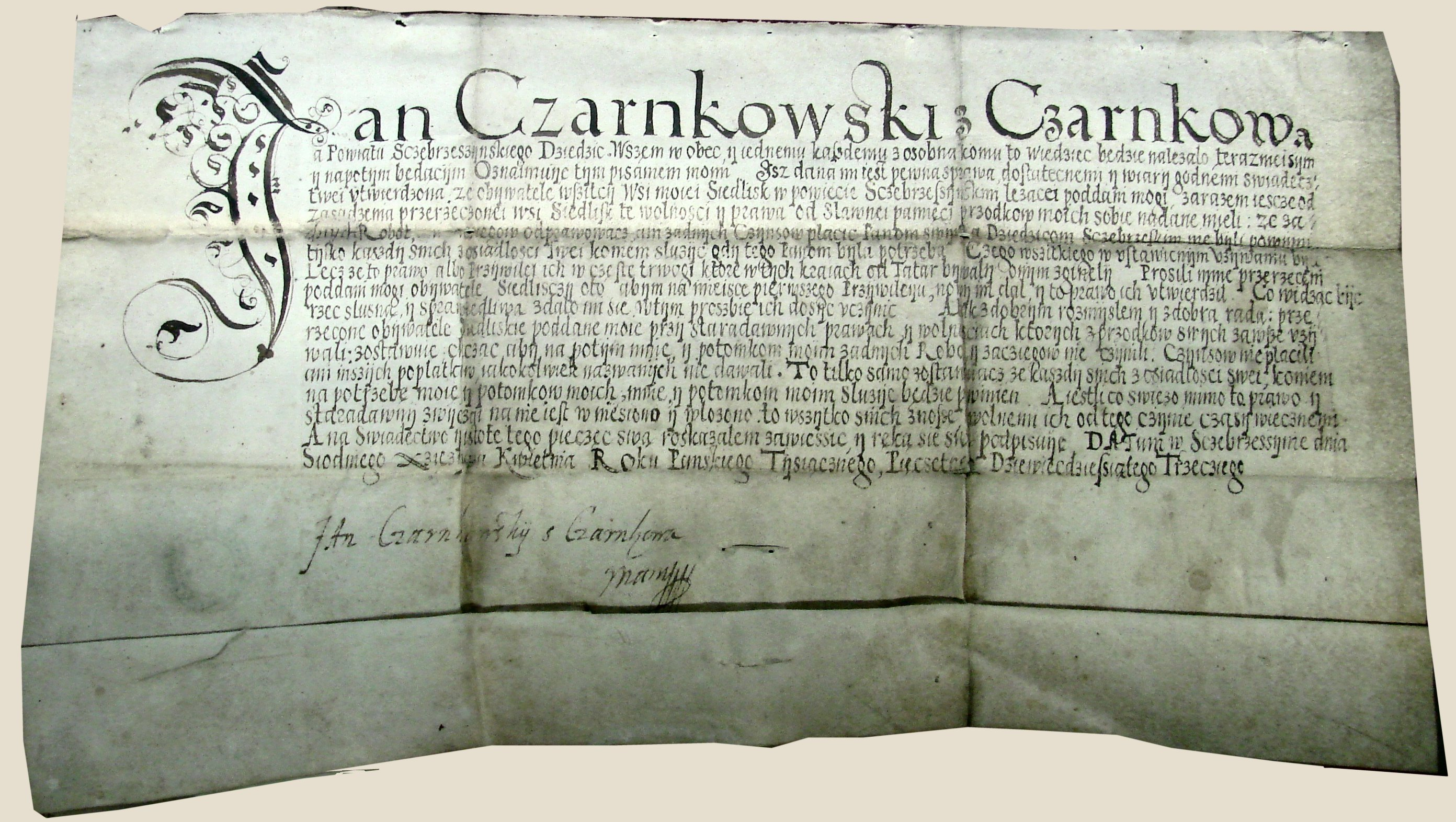 Przywilej z 1593 r. nadany wsi Siedliska pod Zamościem (Powiat Zamojski) przez Jana Czarnkowskiego z Czarnkowa.